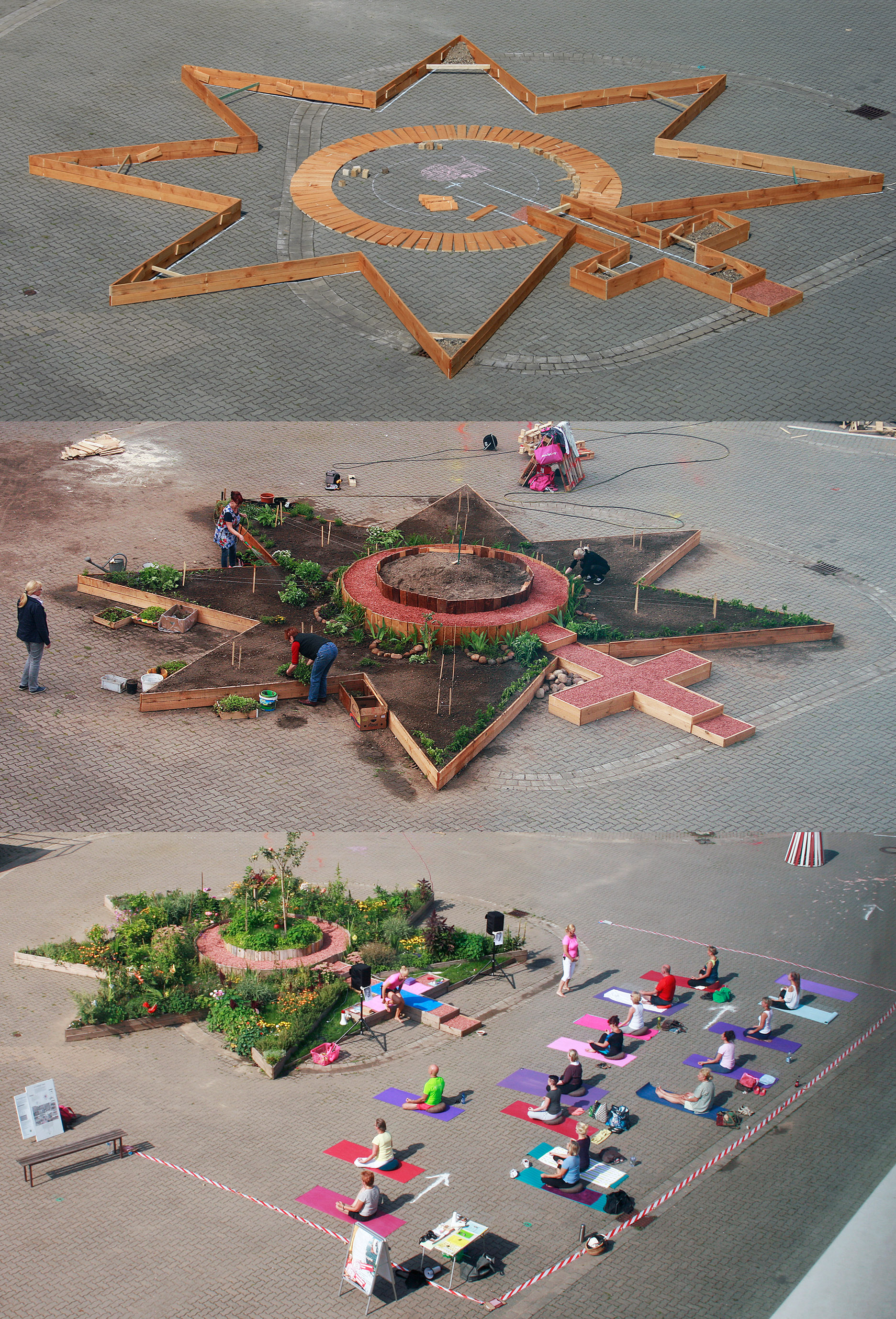 2015 - Entwicklung und Interaktion des begehbaren Sternparks, ehemaliges JVA-Gelände Suderstadt, Fotografie von Dieter Gerschler